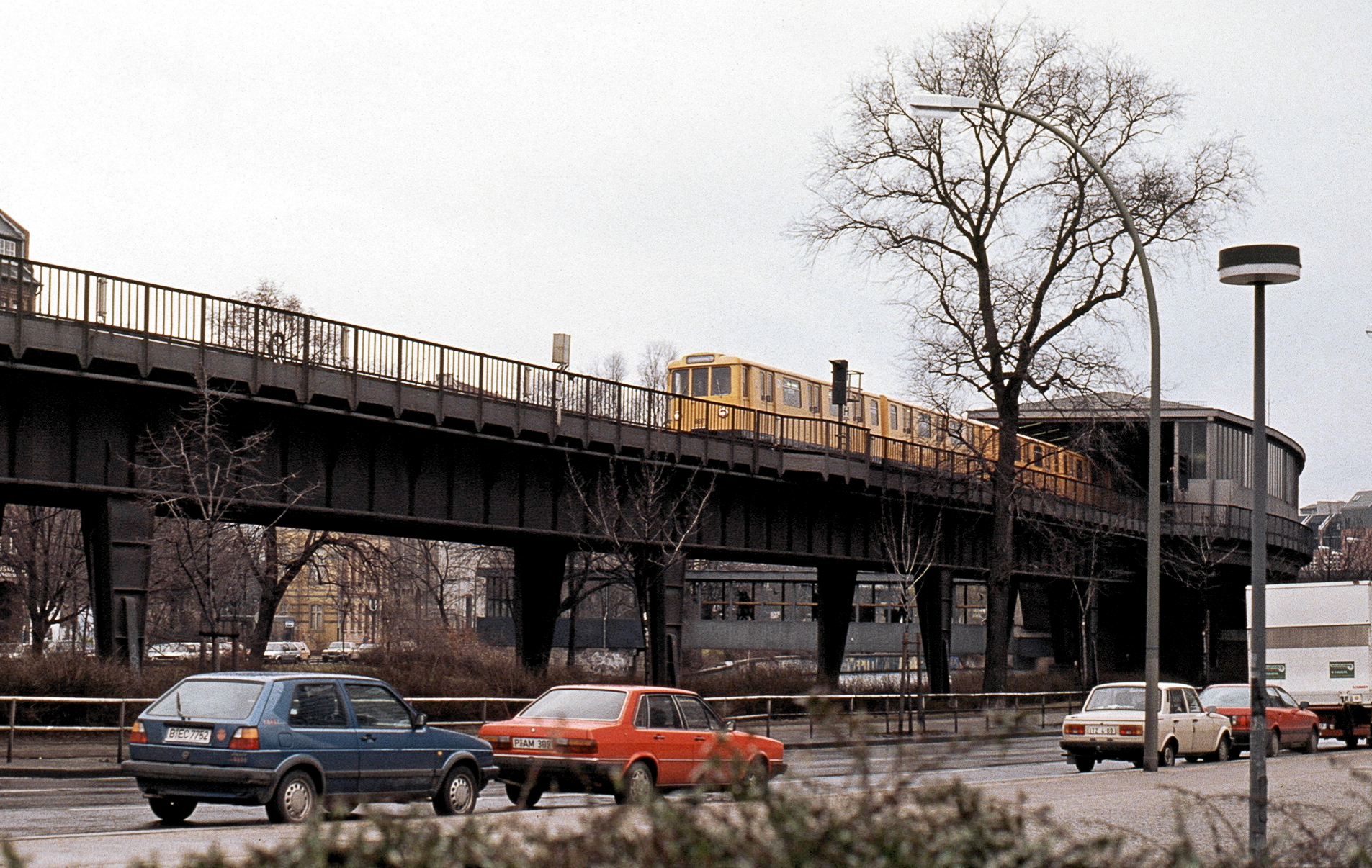 U-Bahnhof Möckernbrücke Berlin